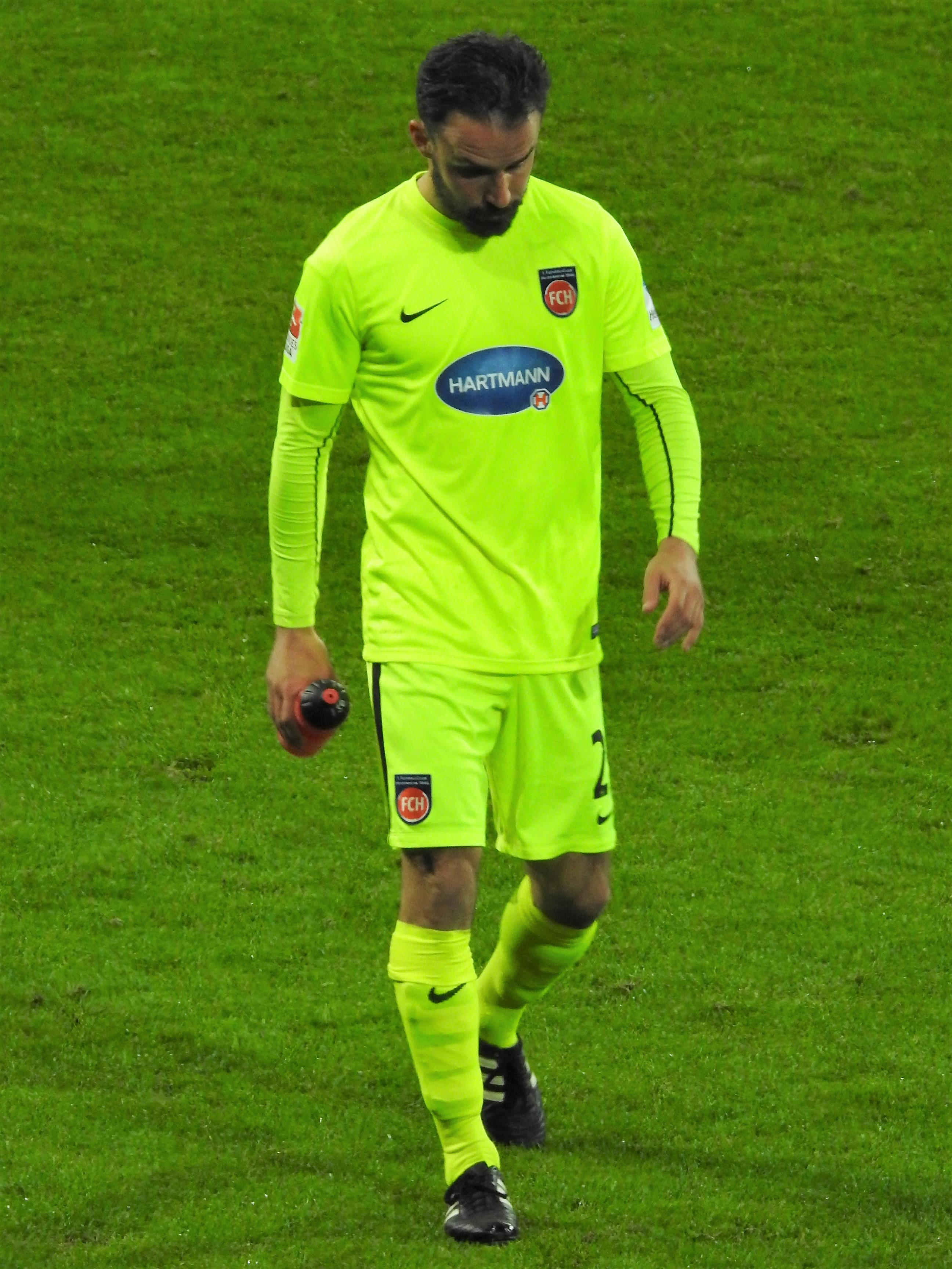 Robert Strauß 2017